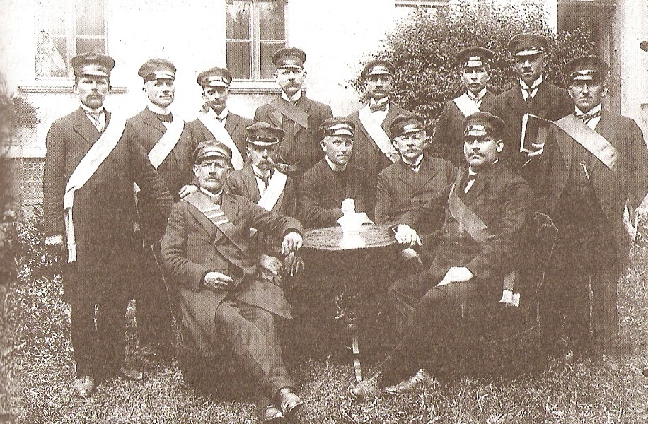 Polska, woj. wielkopolskie, Dobrzyca, Bractwo Strzeleckie imienia św. Tekli